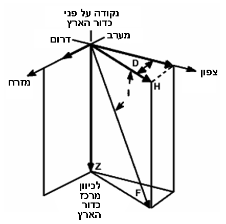 רכיבי השדה המגנטי של כדור הארץ.